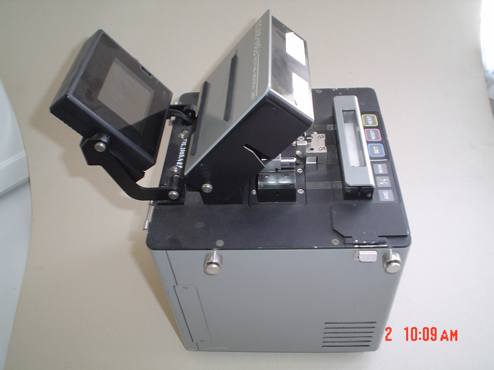 Veldilo por optika kablo.